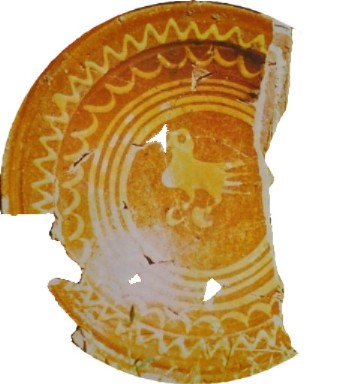 Een bord van roodbakkend aardewerk met zogenaamde slipversiering, afkomstig van een Nederrijnse pottenbakker, aan het vogeltje te zien daterend uit de periode rond 1600.